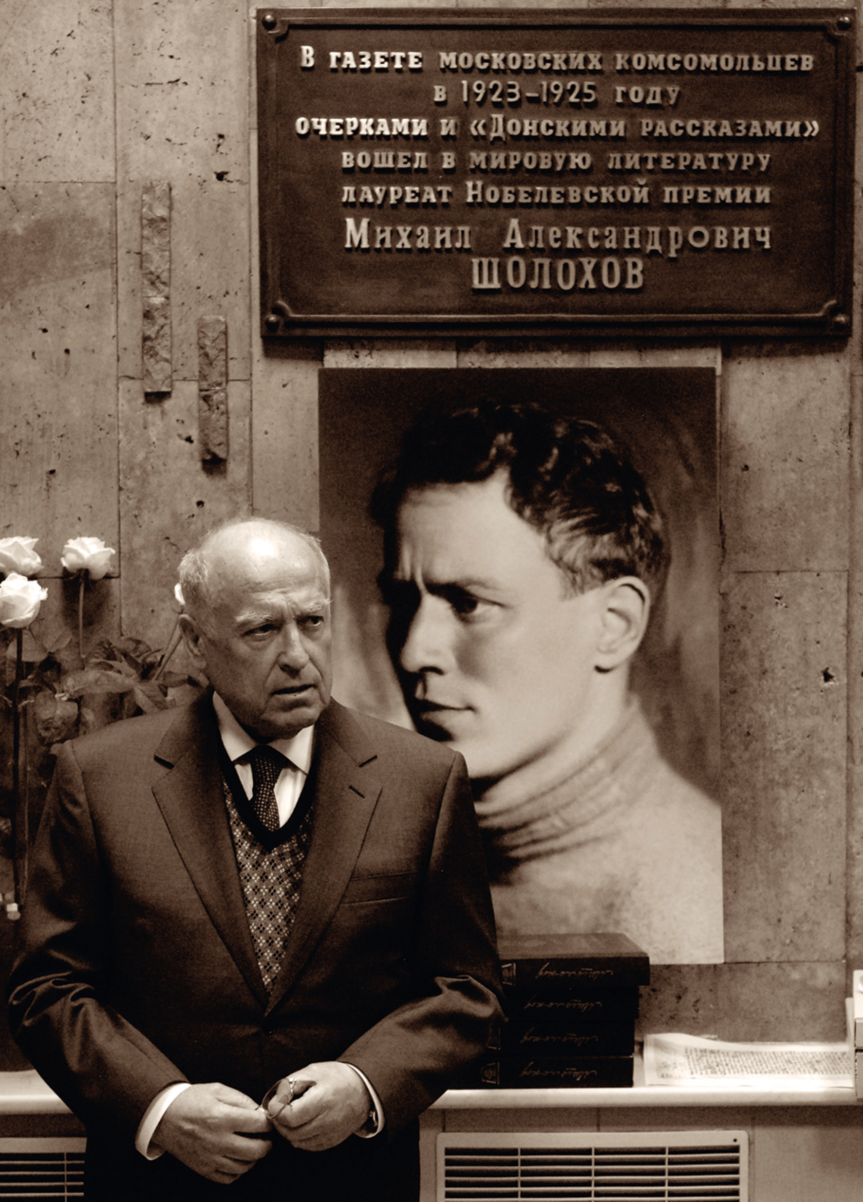 23.09.2009 г. Виктор Черномырдин в "Московском Комсомольце"